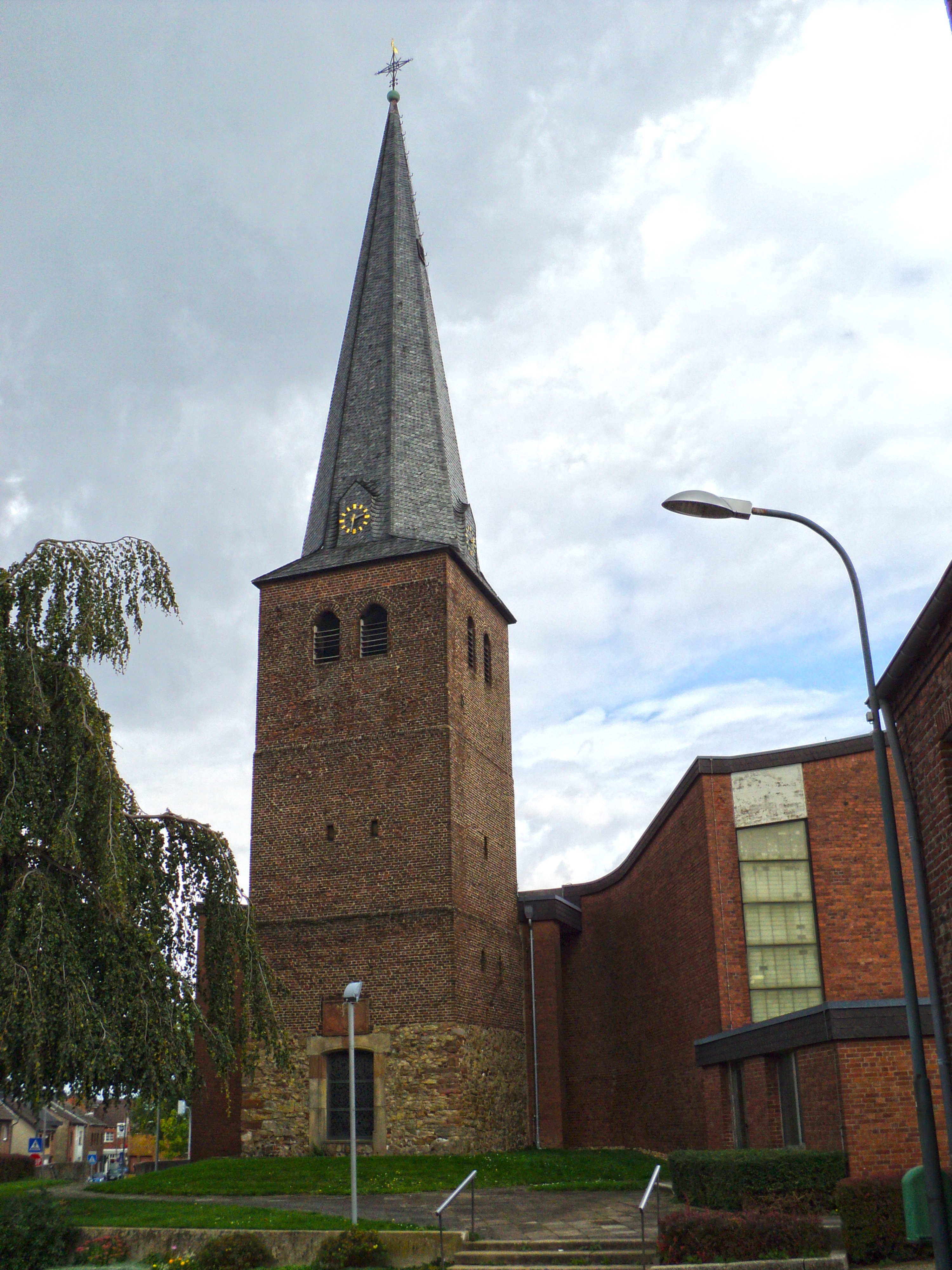 Pfarrkirche St. Peter in Düren-Merken (Nordrhein-Westfalen), Westseite mit Glockenturm.